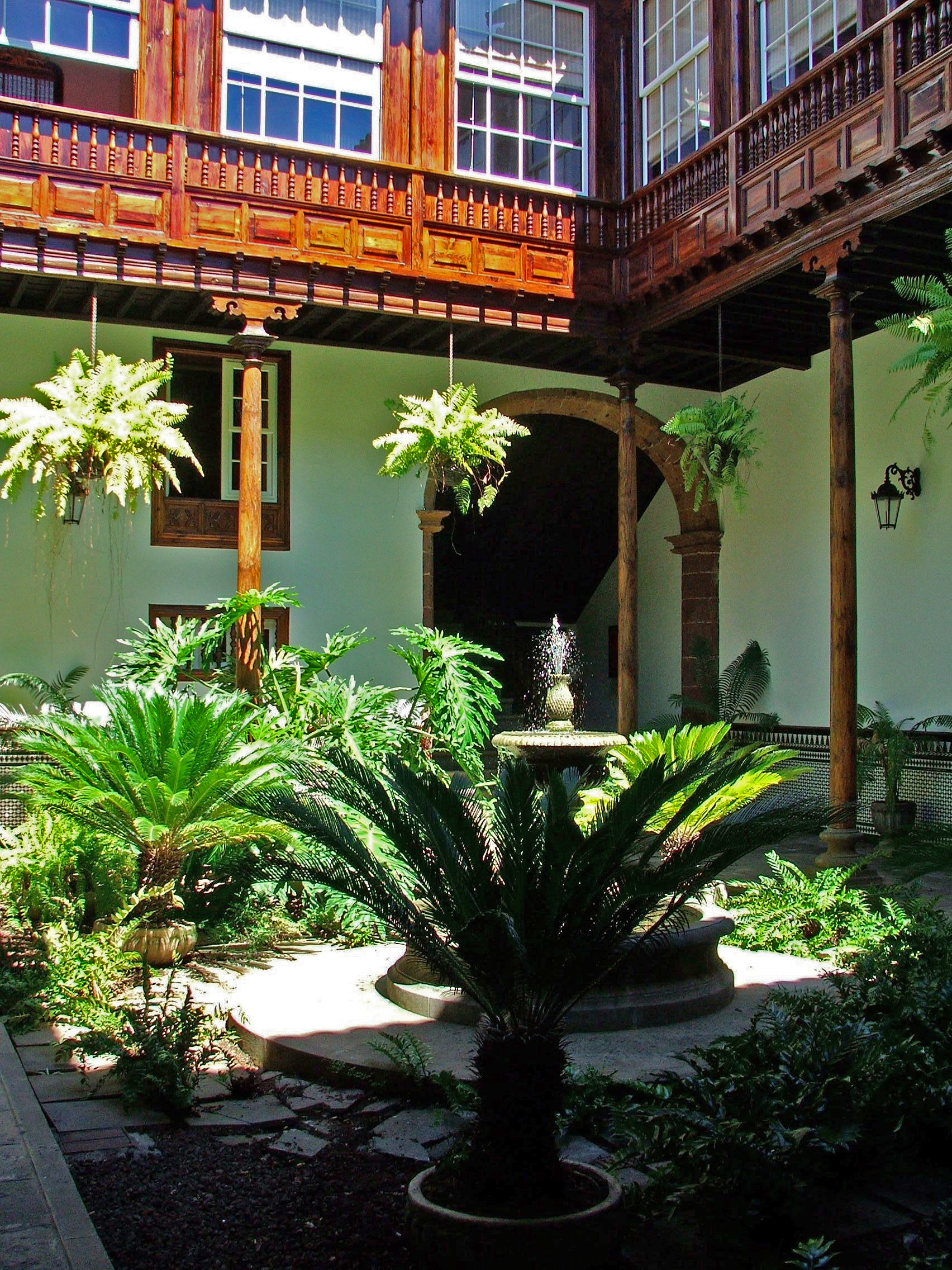 Casa Montañéz, Patio, La Laguna